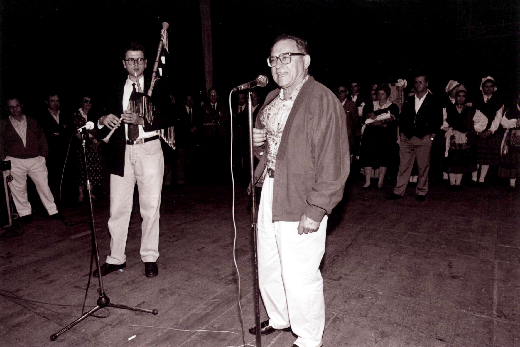 Noriega canta en su homenaje, Teatro Jovellanos 1991